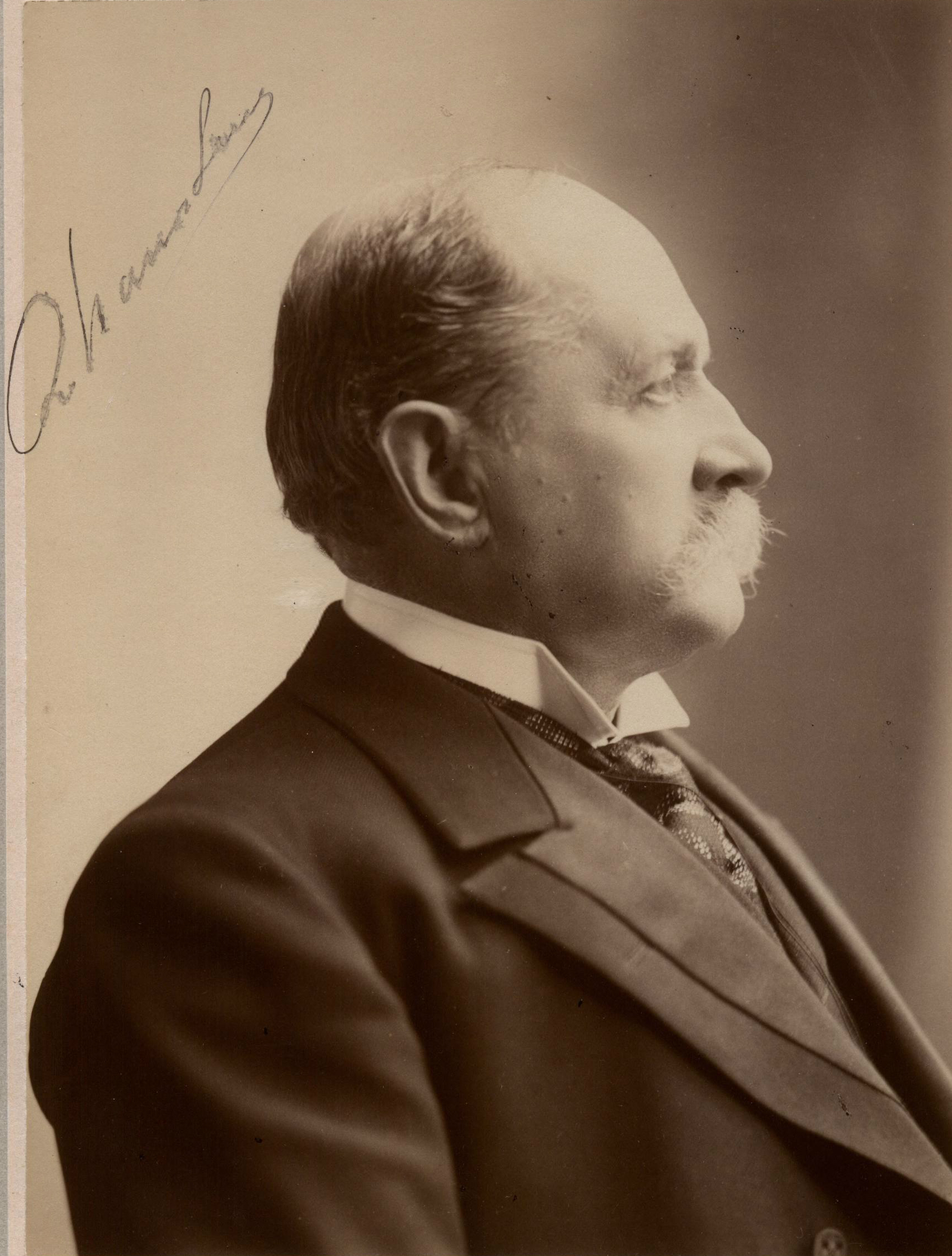 Ramón Barros Luco (* Santiago, Chile, 9 de junio de 1835 – † ibídem, 20 de septiembre de 1919) fue presidente de Chile.